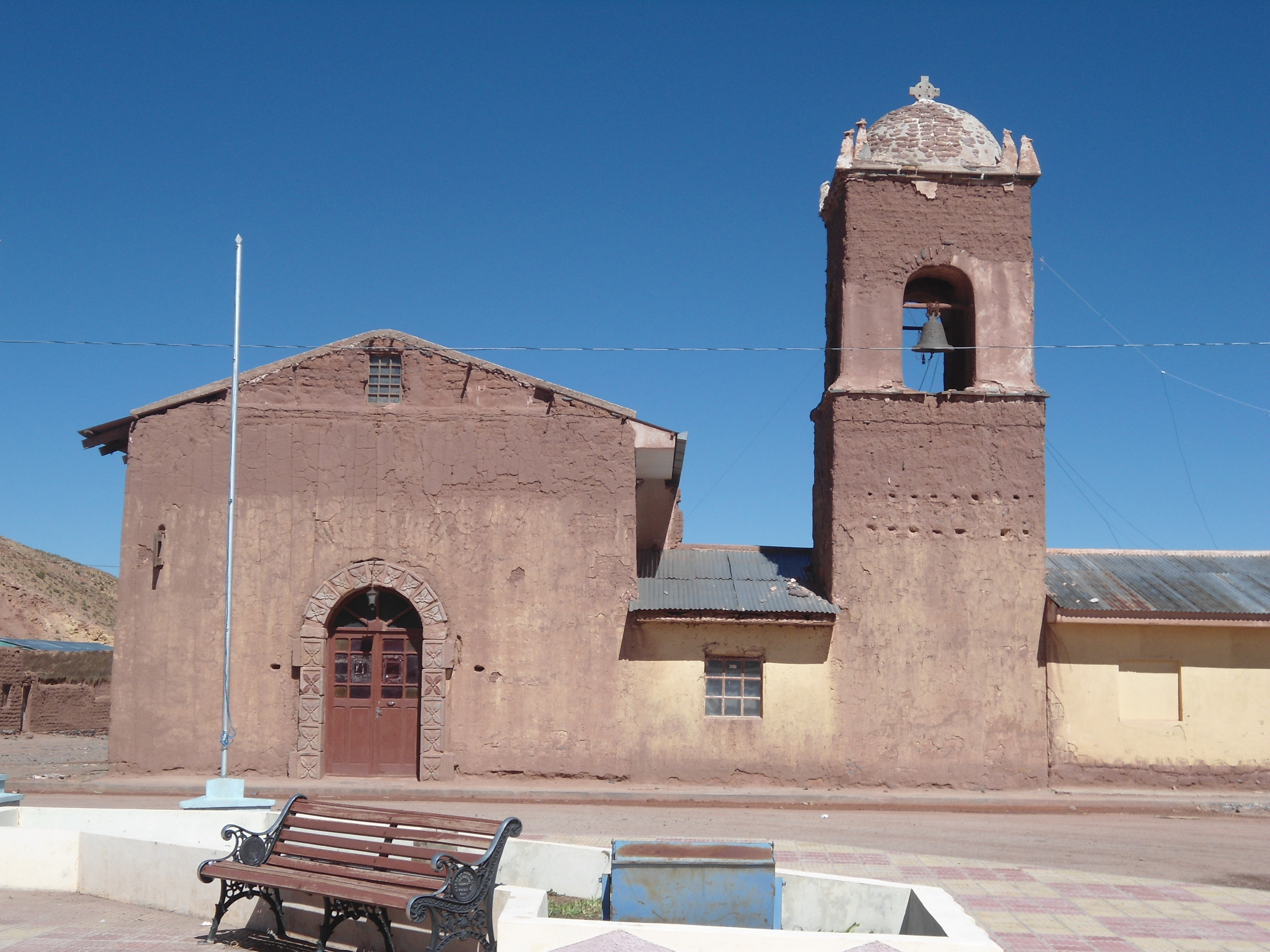 Iglesia de San Pablo de Lipez